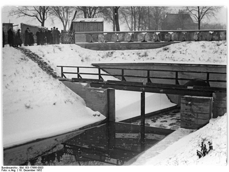 Berlin, Nordgraben, Brücke, Winter Zentralbild I Einweihung des Nordgrabens Um der Panke ihre übermütigen Sprünge während der Eisschmelze über ihre Ufer zu nehmen und dadurch Schaden zu verhindern, wurde der Nordgraben gebaut, der die Wasser der Panke in den Tegeler See leitet. Der Nordgraben wurde am 18.12.52 durch die Groß-Berliner-Wasser- und Entwässerungswerke eingeweiht.UBz: Der Nordgraben mit einer Brücke in Buchholz.